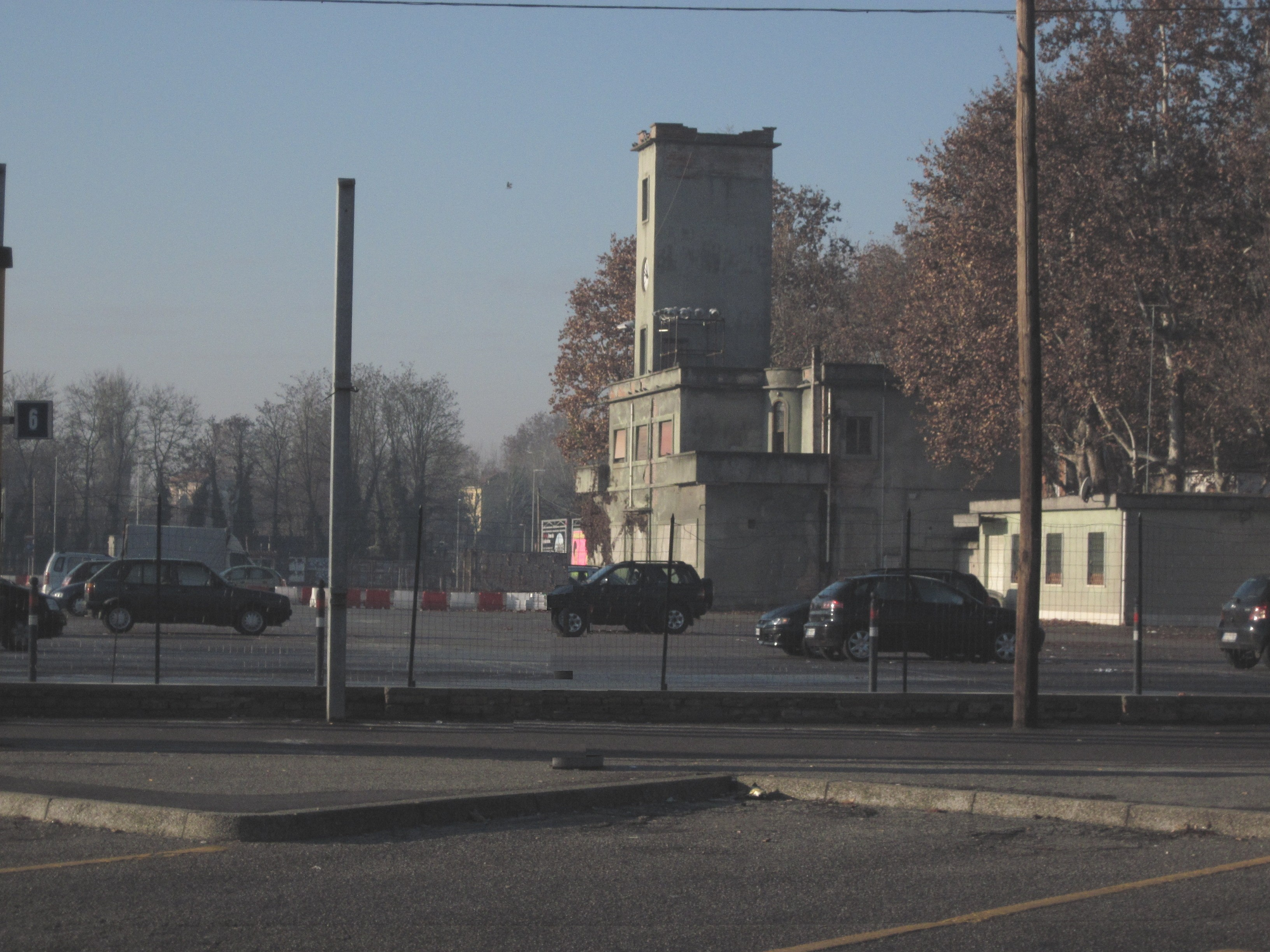 Ferrara ex MOF mercato orto frutticolo